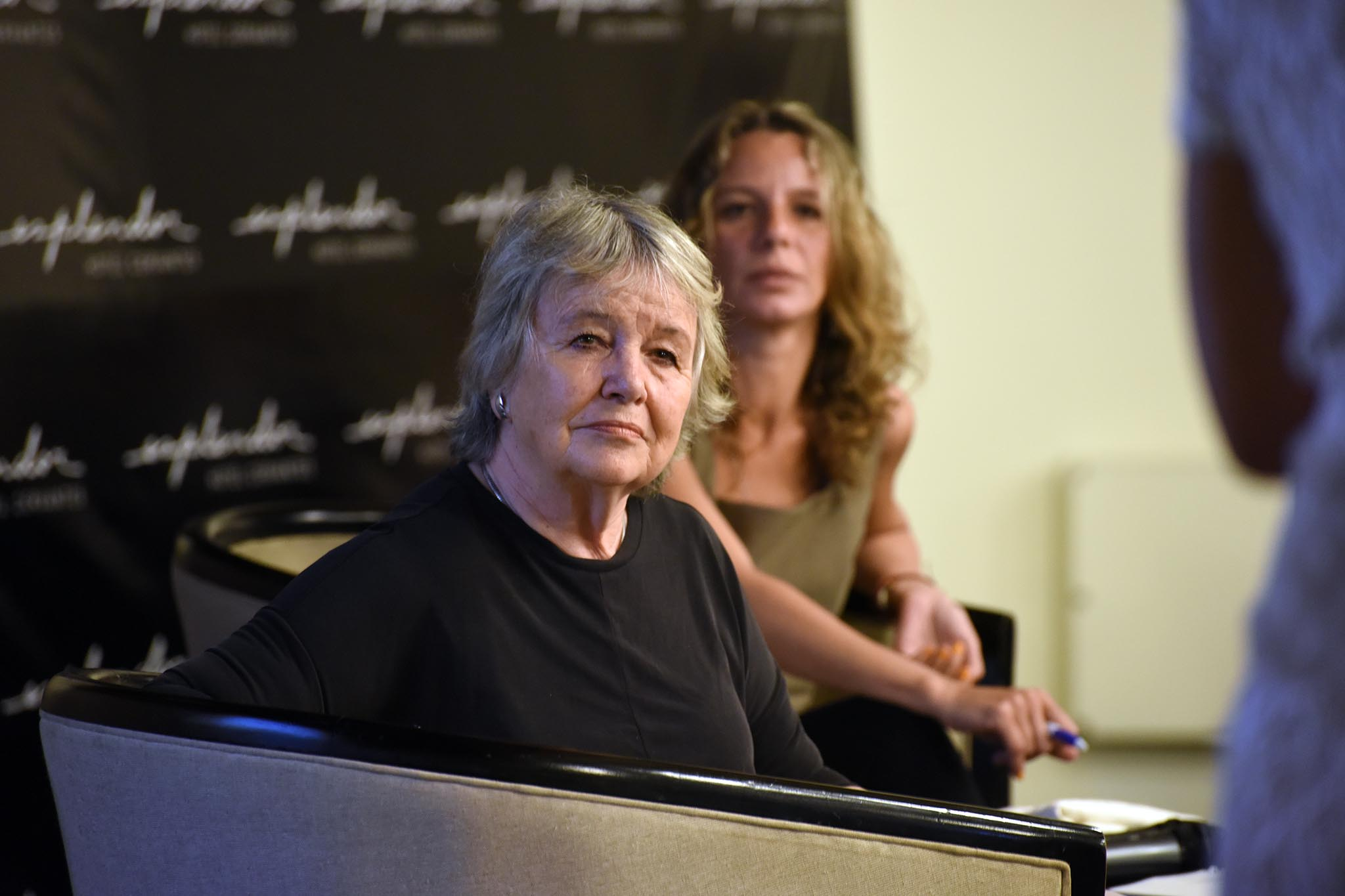 Carmen Beramendi en 2018.